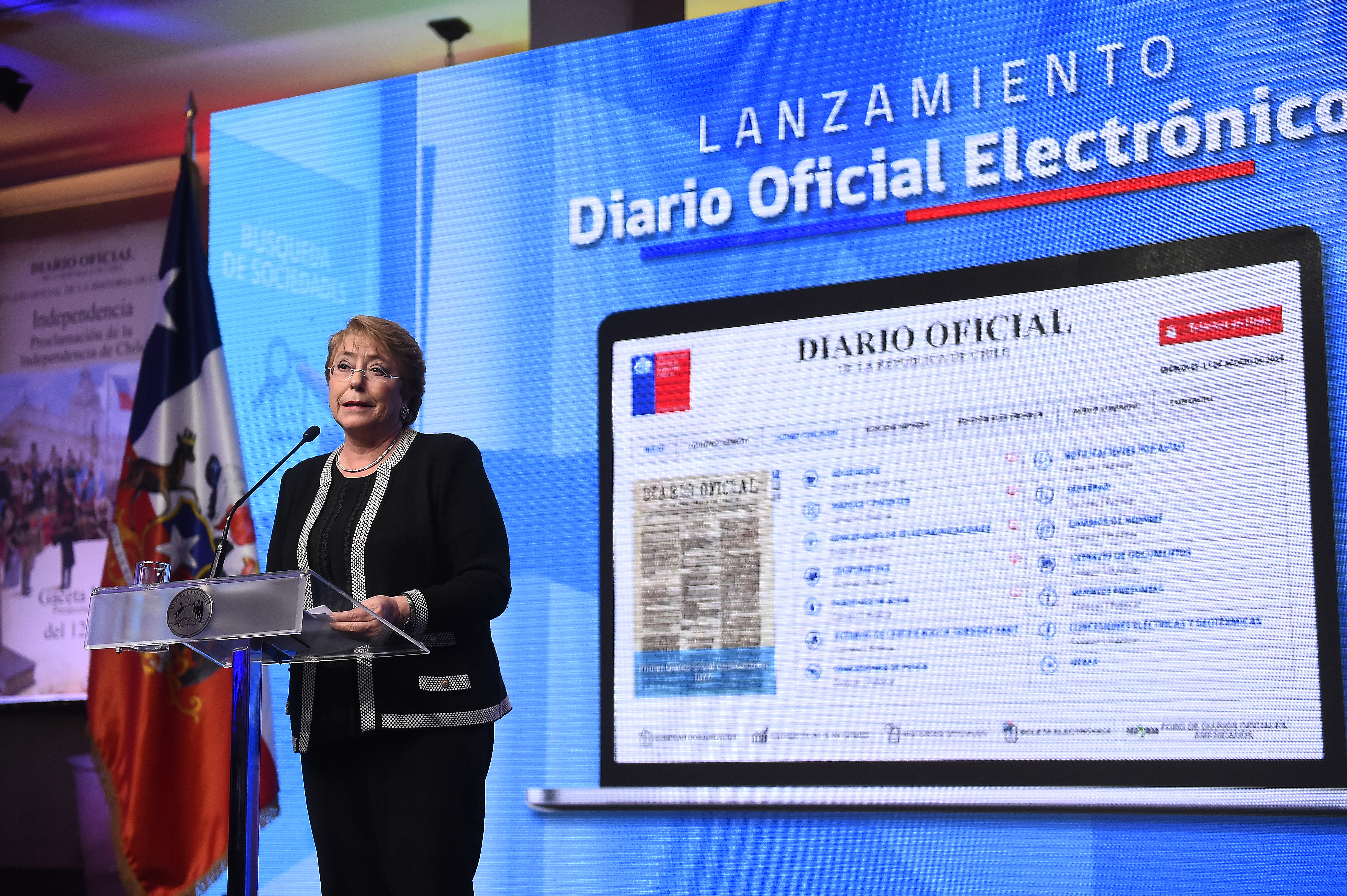 Gobierno de Chile